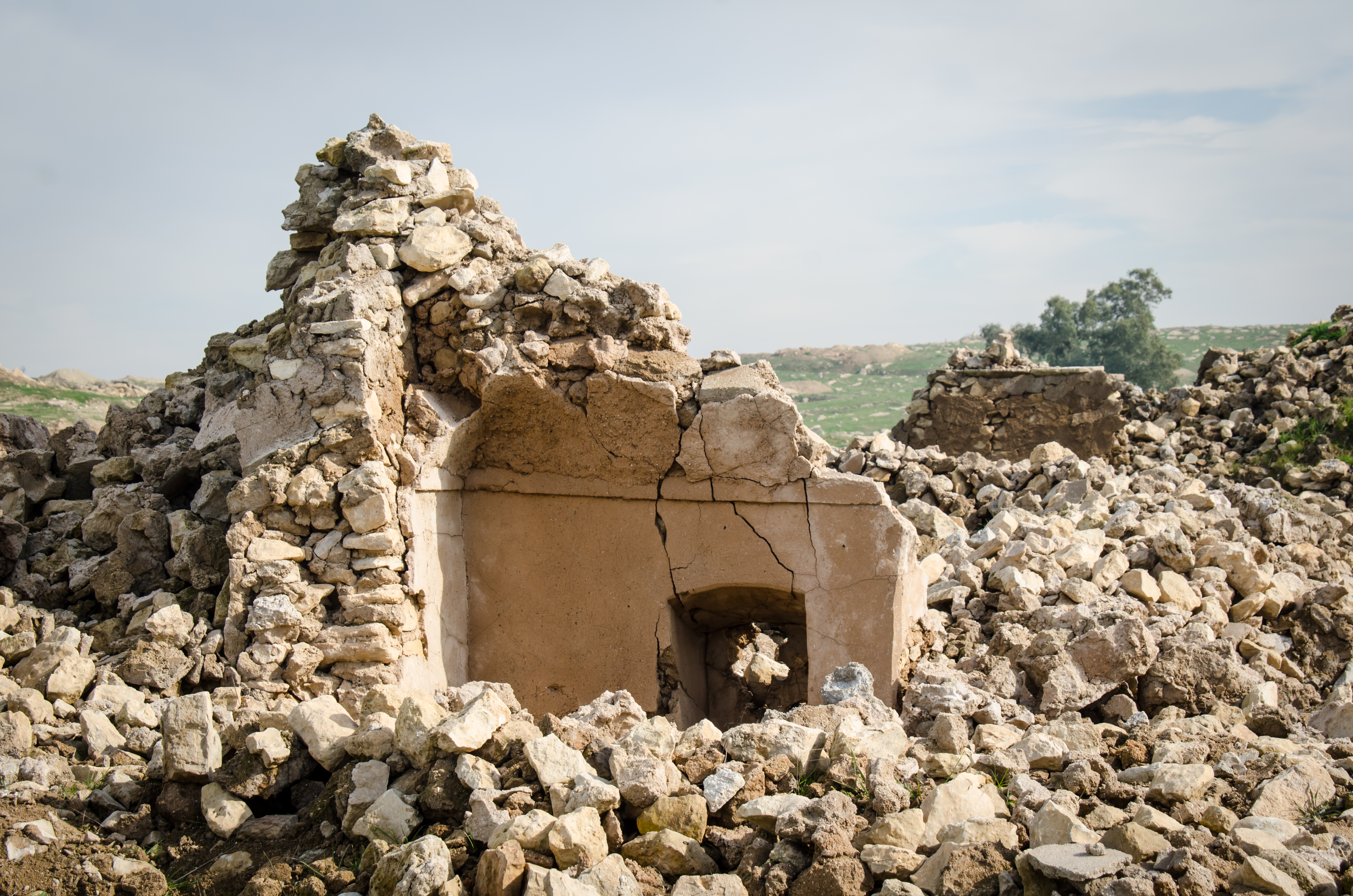 Das Foto dokumentiert die letzten Reste des Klosters (Januar 2019) nach der Zerstörung durch den IS.